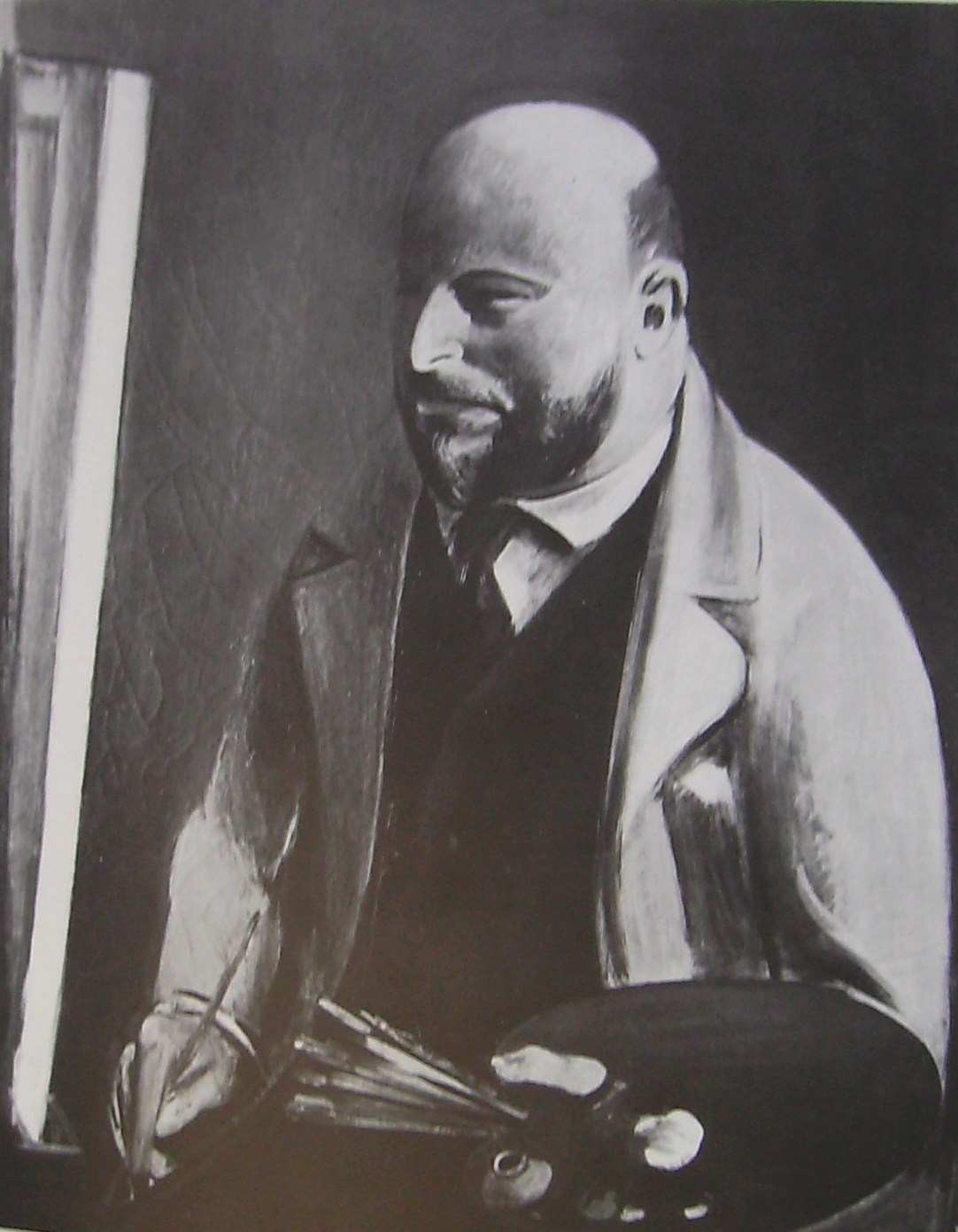 Portrait Hans Purrmann (Ölgemälde von Rudolf Levy, um 1913)